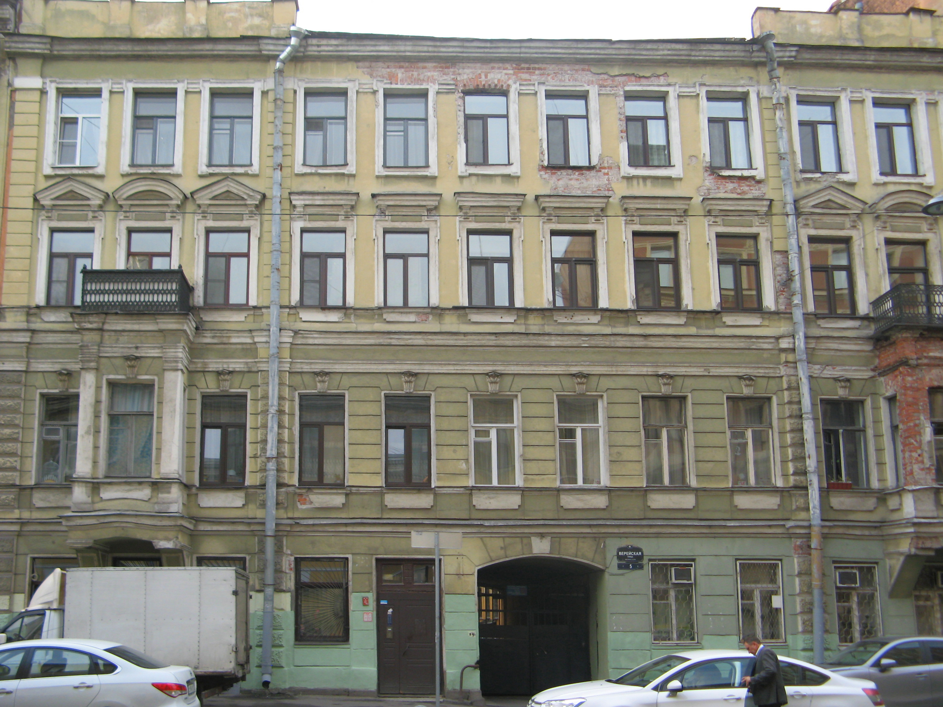 Дом, в котором жил Ленин В.И.: улица Верейская, 5, Адмиралтейский район, Санкт-Петербург